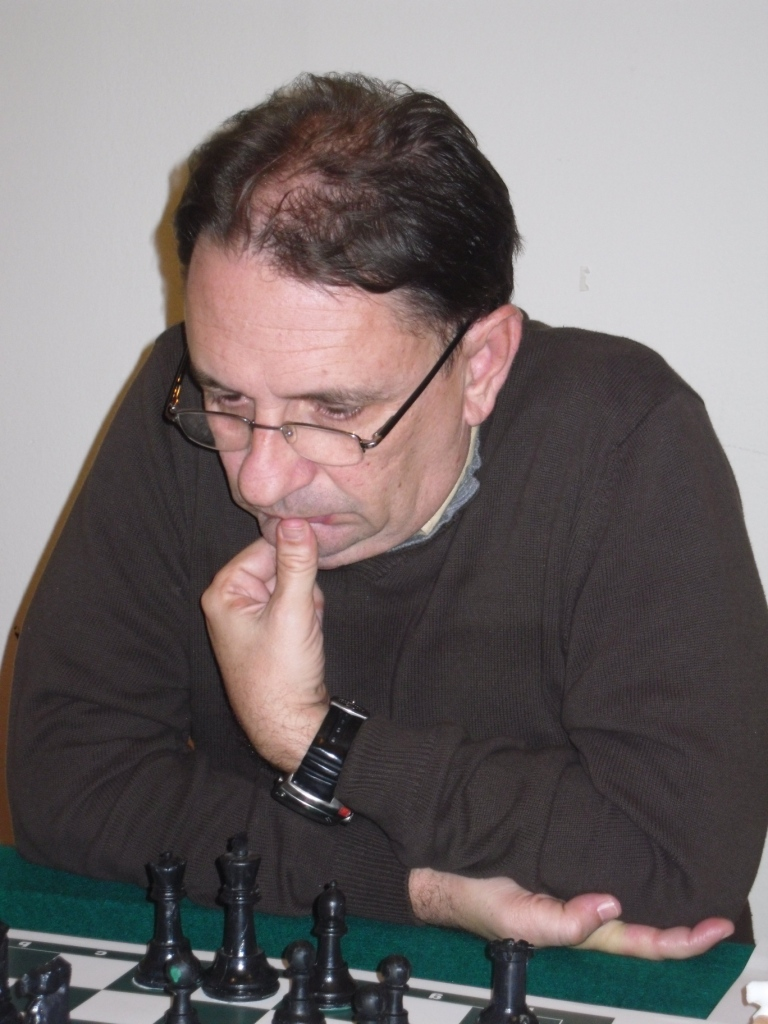 GM Reynaldo Vera Cuba, Merida 2008.